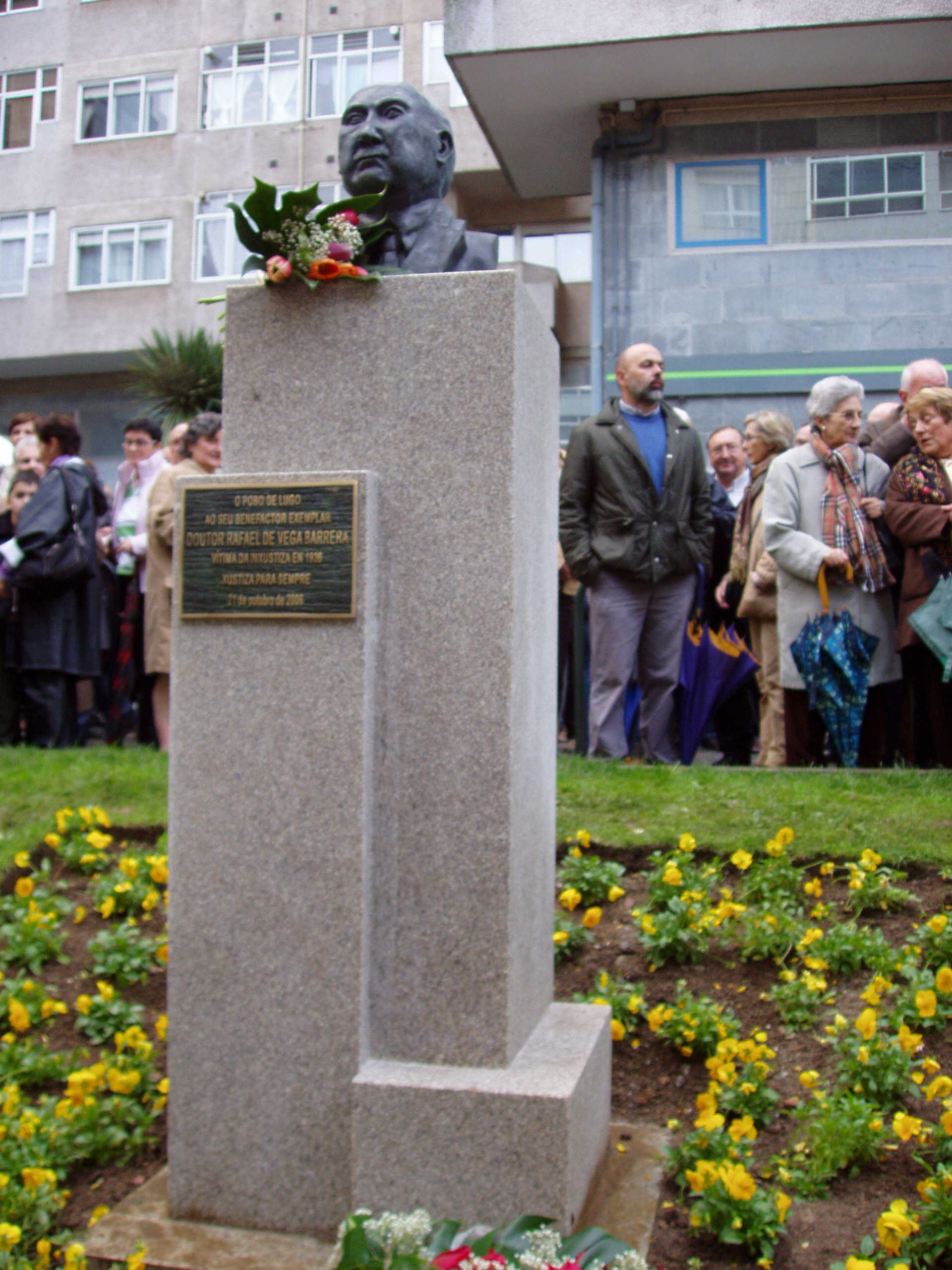 Homenaje al Dr. Rafael de Vega Barrera en la Rua Doutor Rafael de Vega (Lugo).